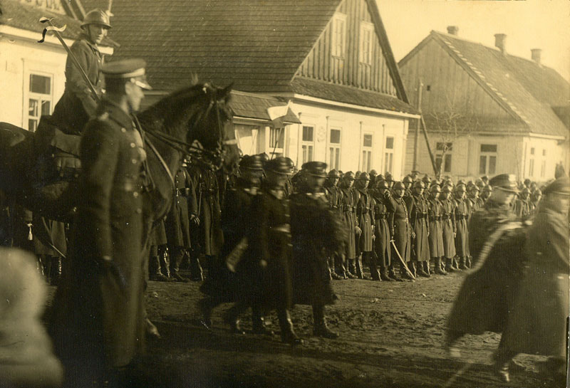 Беларуская (тарашкевіца): Івянец (Ivianiec), вуліца Віленская (vulica Vilenskaja)